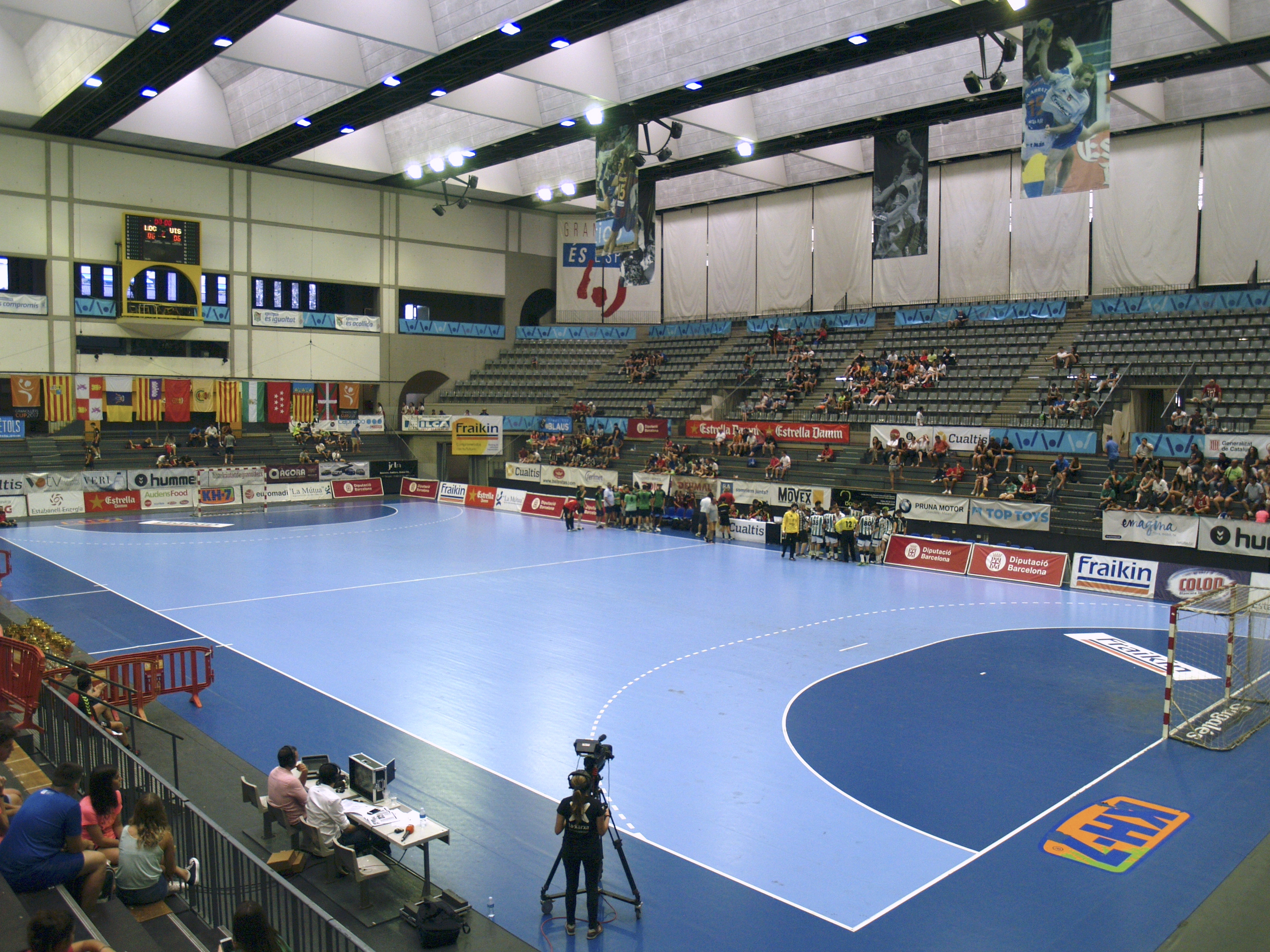 Granollers Cup. Final júnior masculino (1996-97-98)